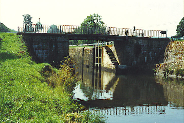 propre photo